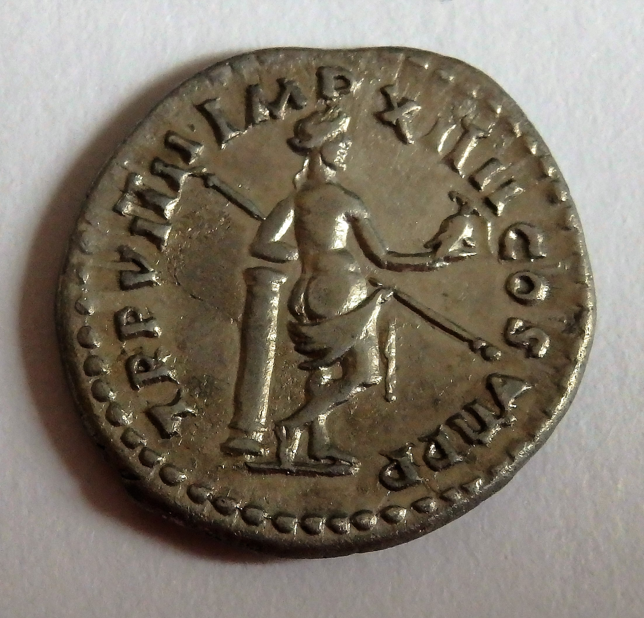 fast nackte Venus auf Denar des Titus', Kampmann 22.84.5